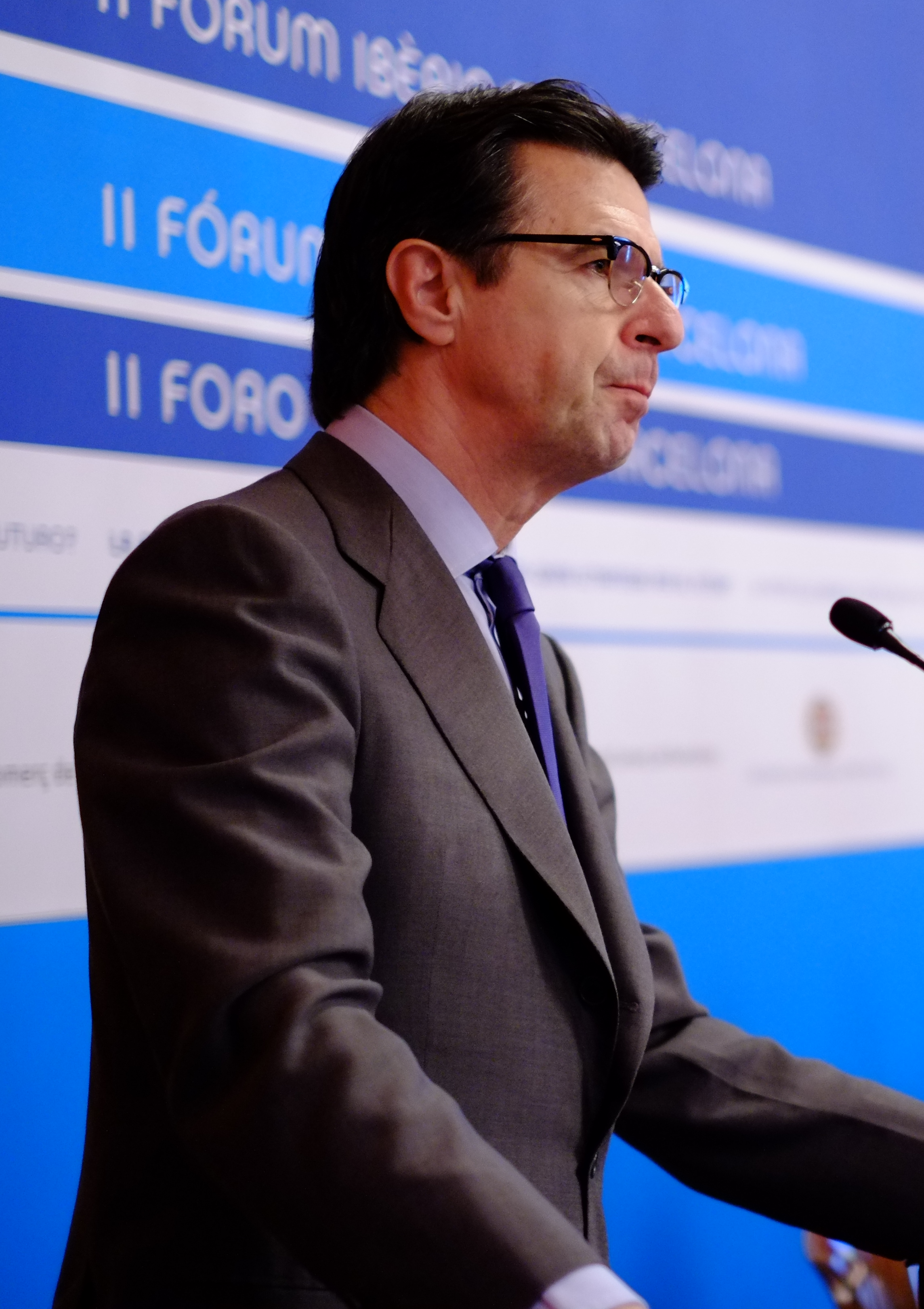 José Manuel Soria en el II Fòrum Ibèric de Barcelona, 5 de junio de 2012.